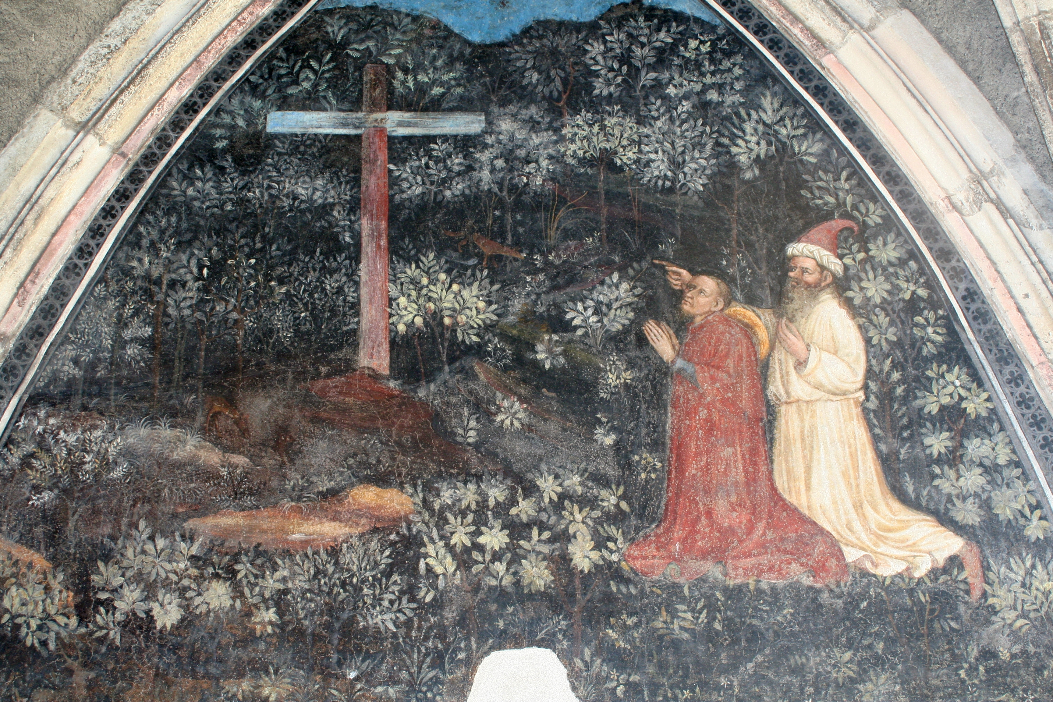 Pfarrkirche St. Nikolaus Fresko (1415) Durchgang: Johann von Matha und Felix von Valois gründen den Trinitarier-Orden